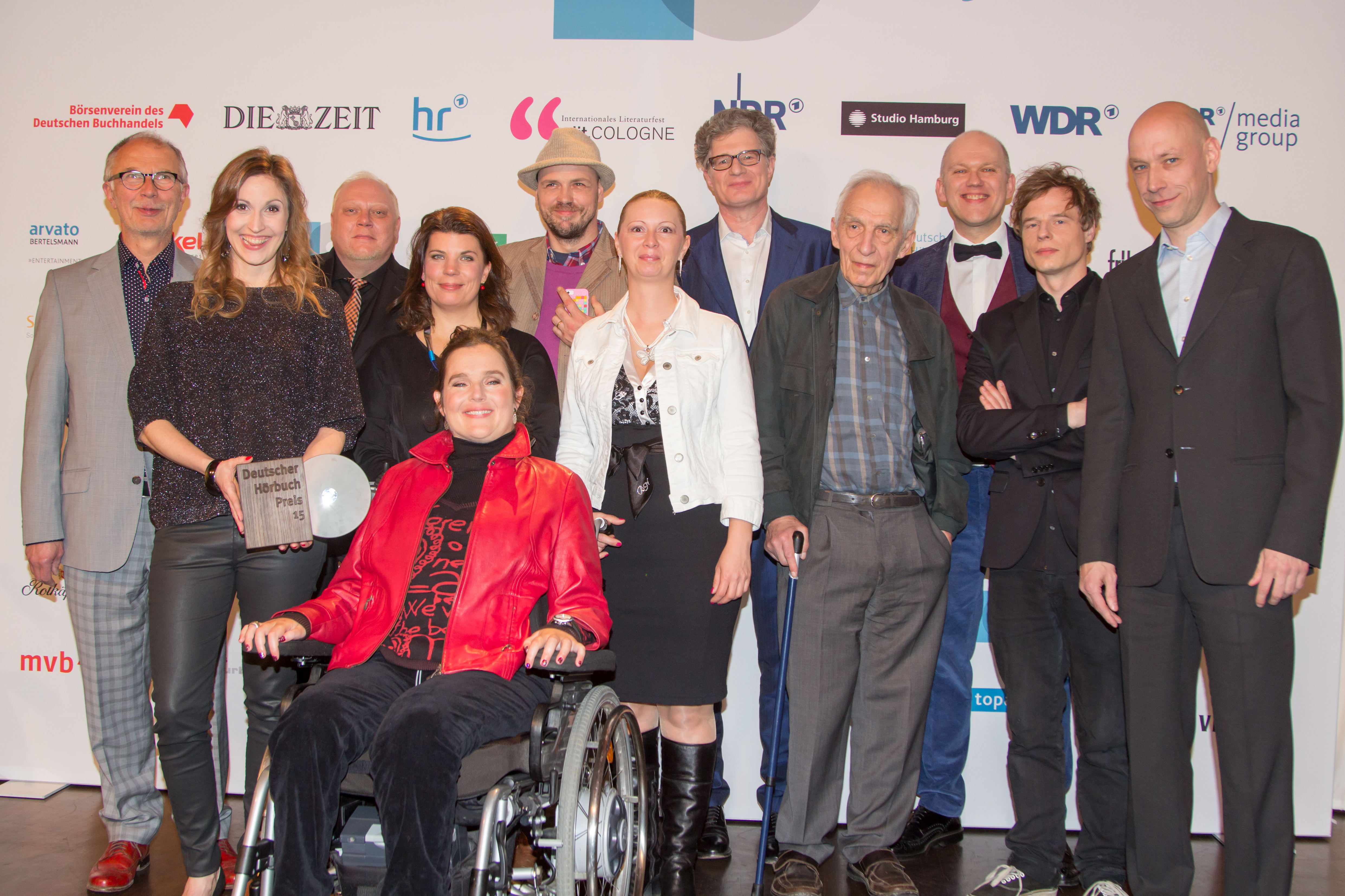 Deutscher Hörbuchpreis 2015, Gruppenbild aller Preisträger